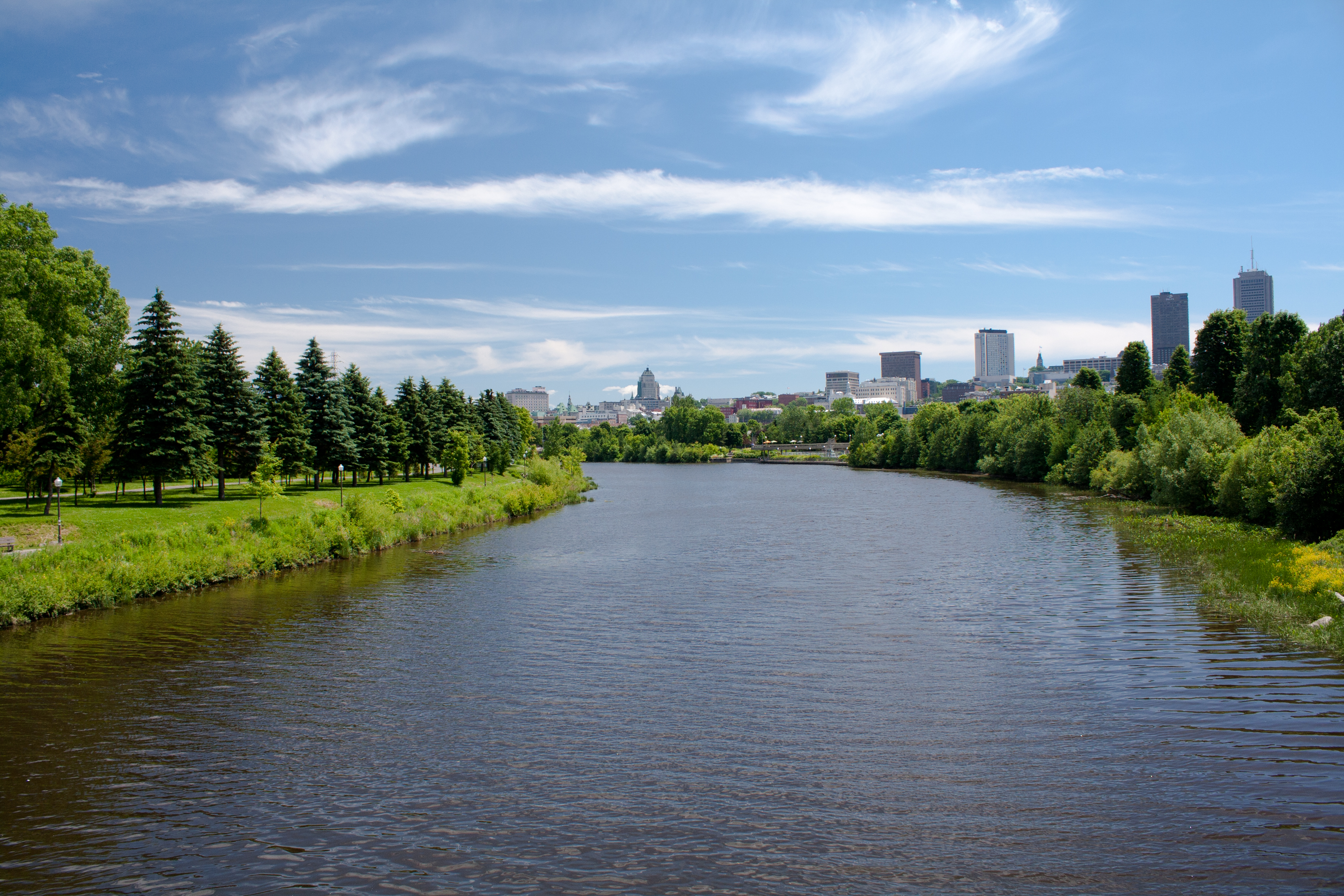 La rivière Saint-Charles, en aval du pont Drouin dans l'arrondissement La Cité-Limoilou de la ville de Québec. À l'arrière-plan, le centre-ville de Québec.